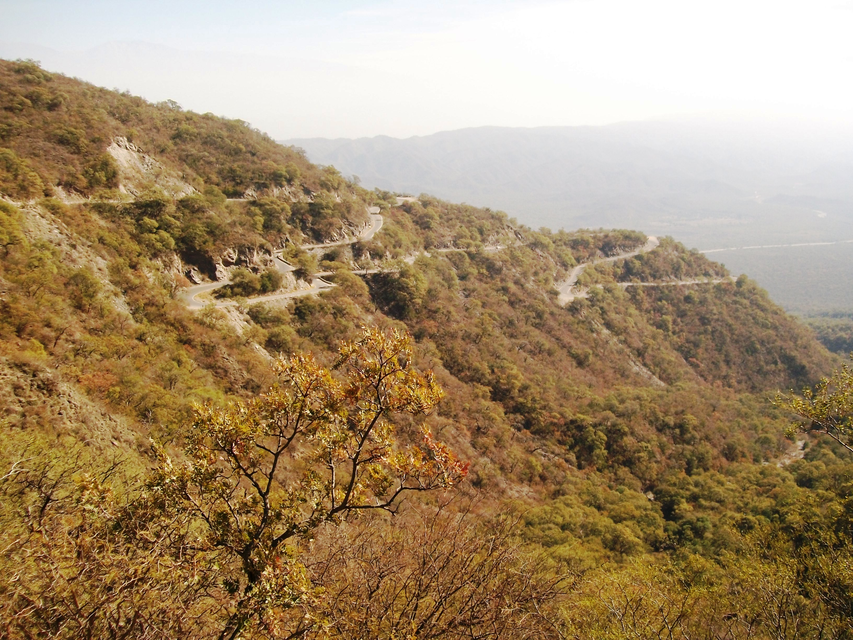 Cuesta del Portezuelo, Catamarca, Argentina